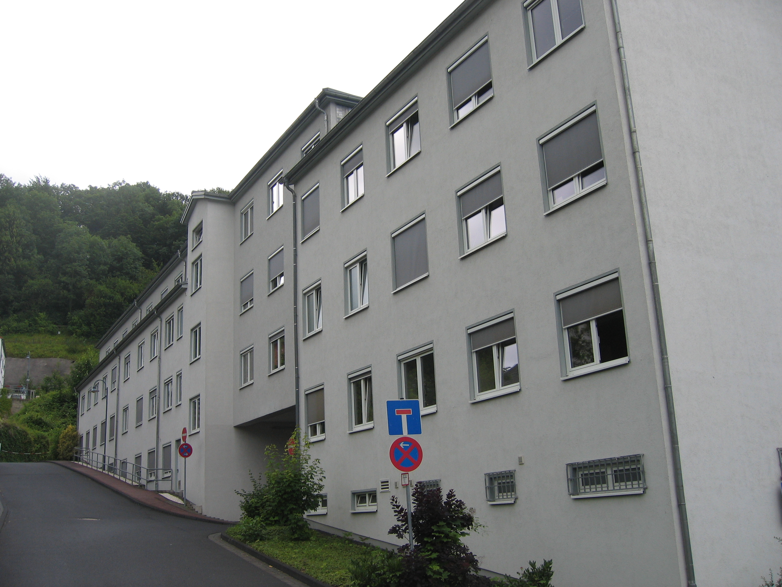 Das Gebäude des Amtsgerichts Linz am Rhein, der Polizei und des Arbeitsamtes